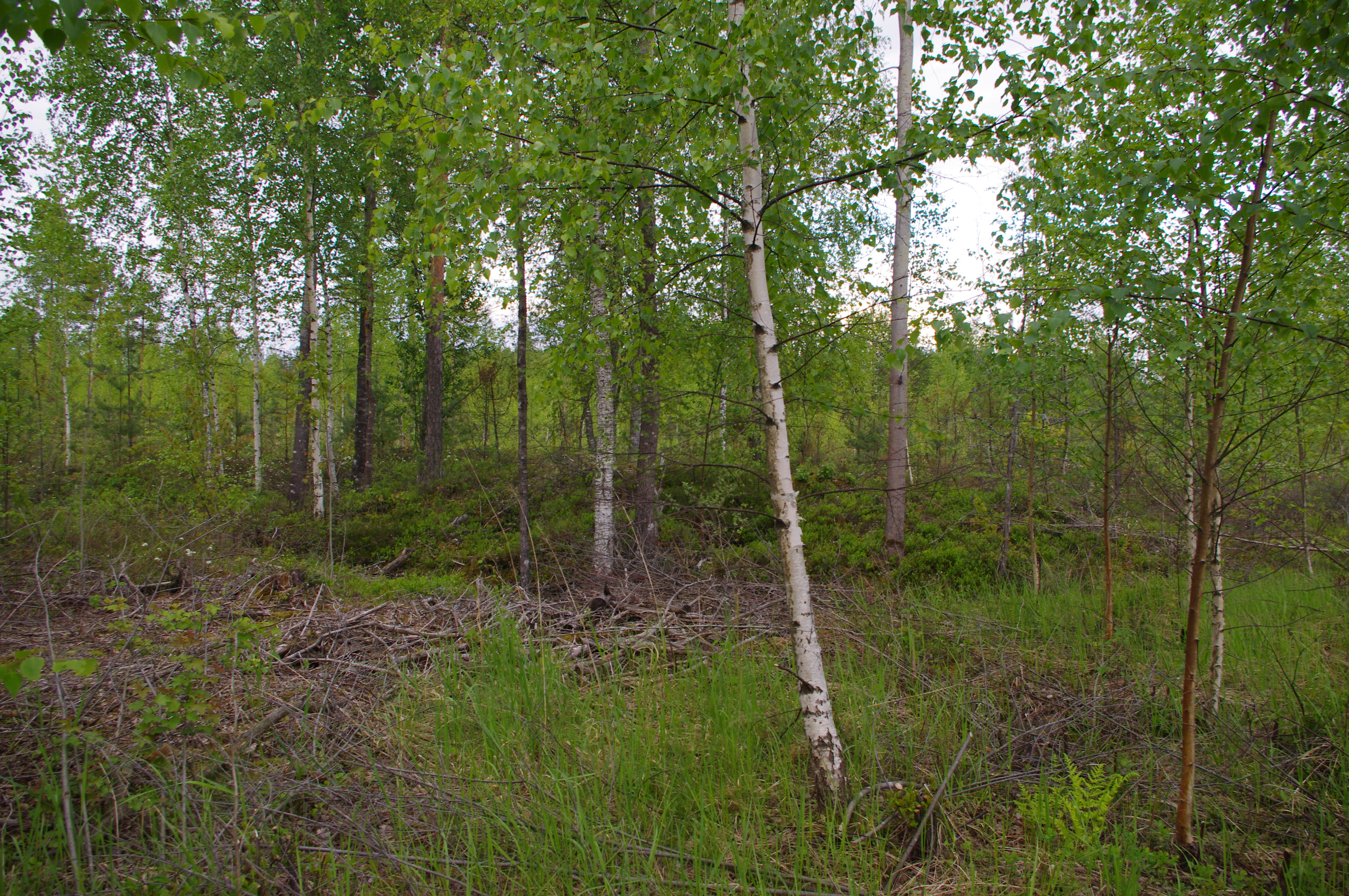 Kääbas